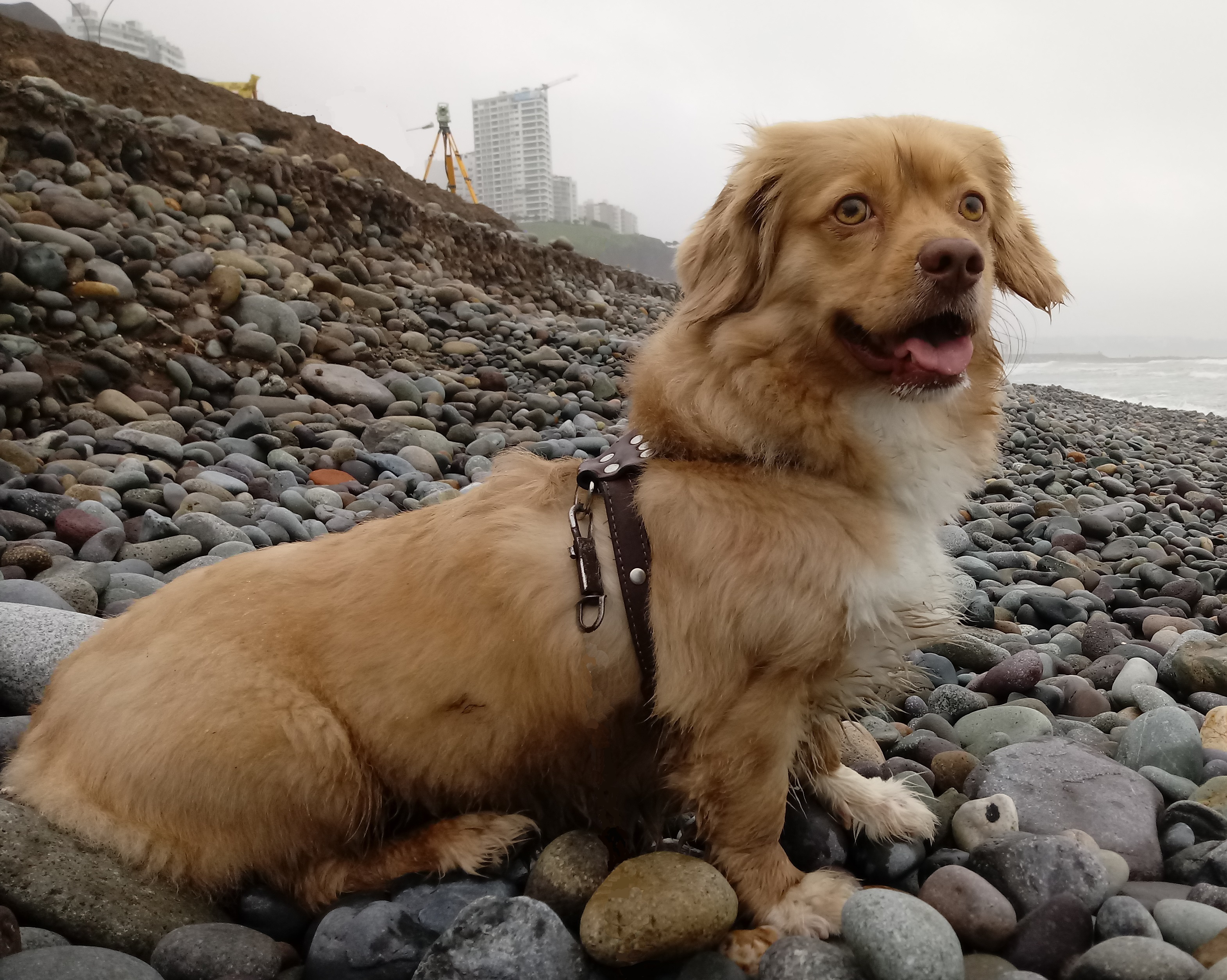 Posible descendiente de pastor de Chiribaya